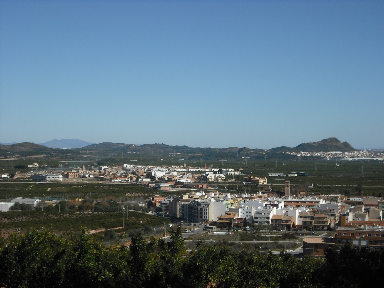 Vista de Benifairó de los Valles y Quartell desde la ermita del Bon Succés del primero. Al fondo a la derecha se distingue Almenara